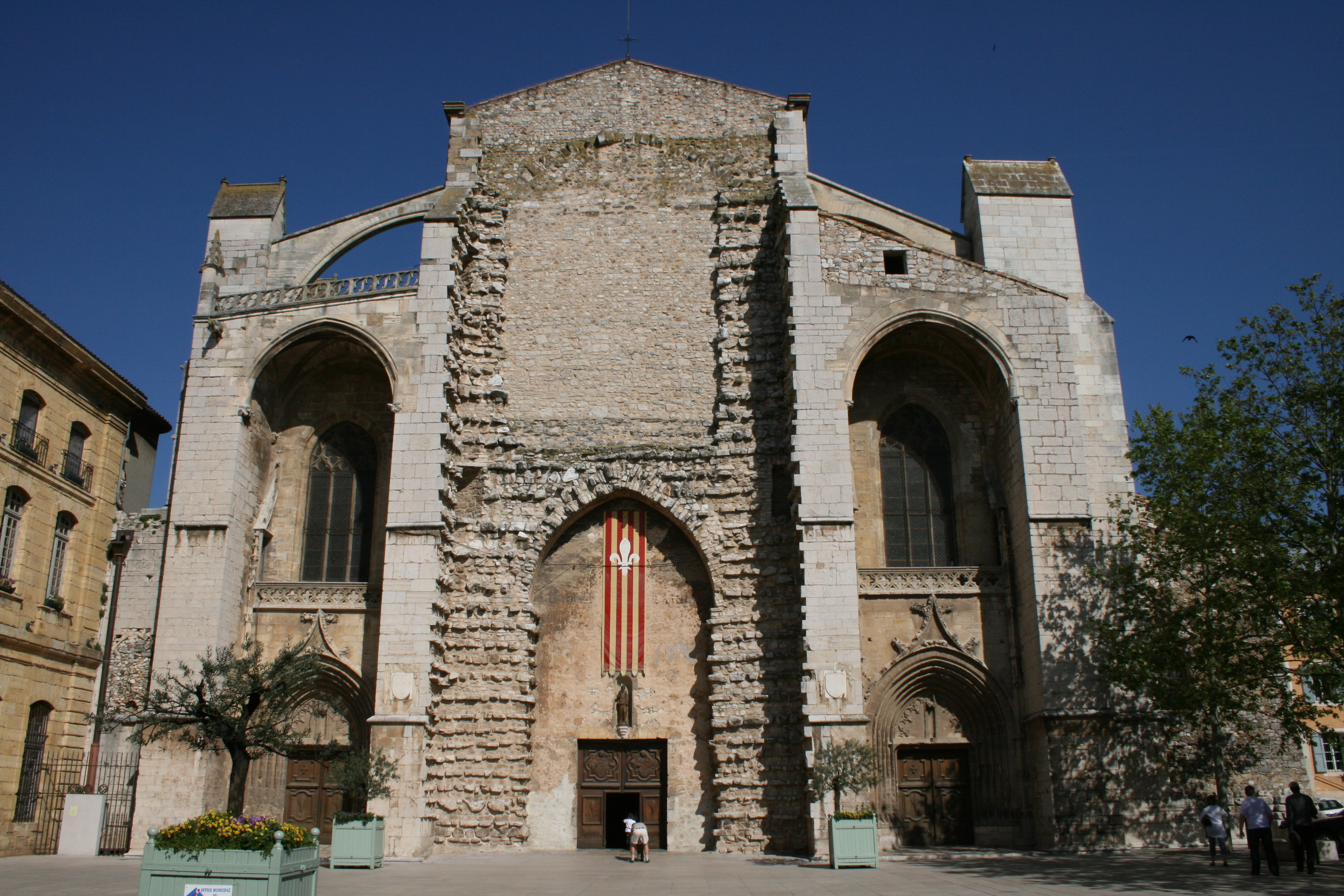 Basilique Sainte-Marie-Madeleine de Saint-Maximin-la-Sainte-Baume portail